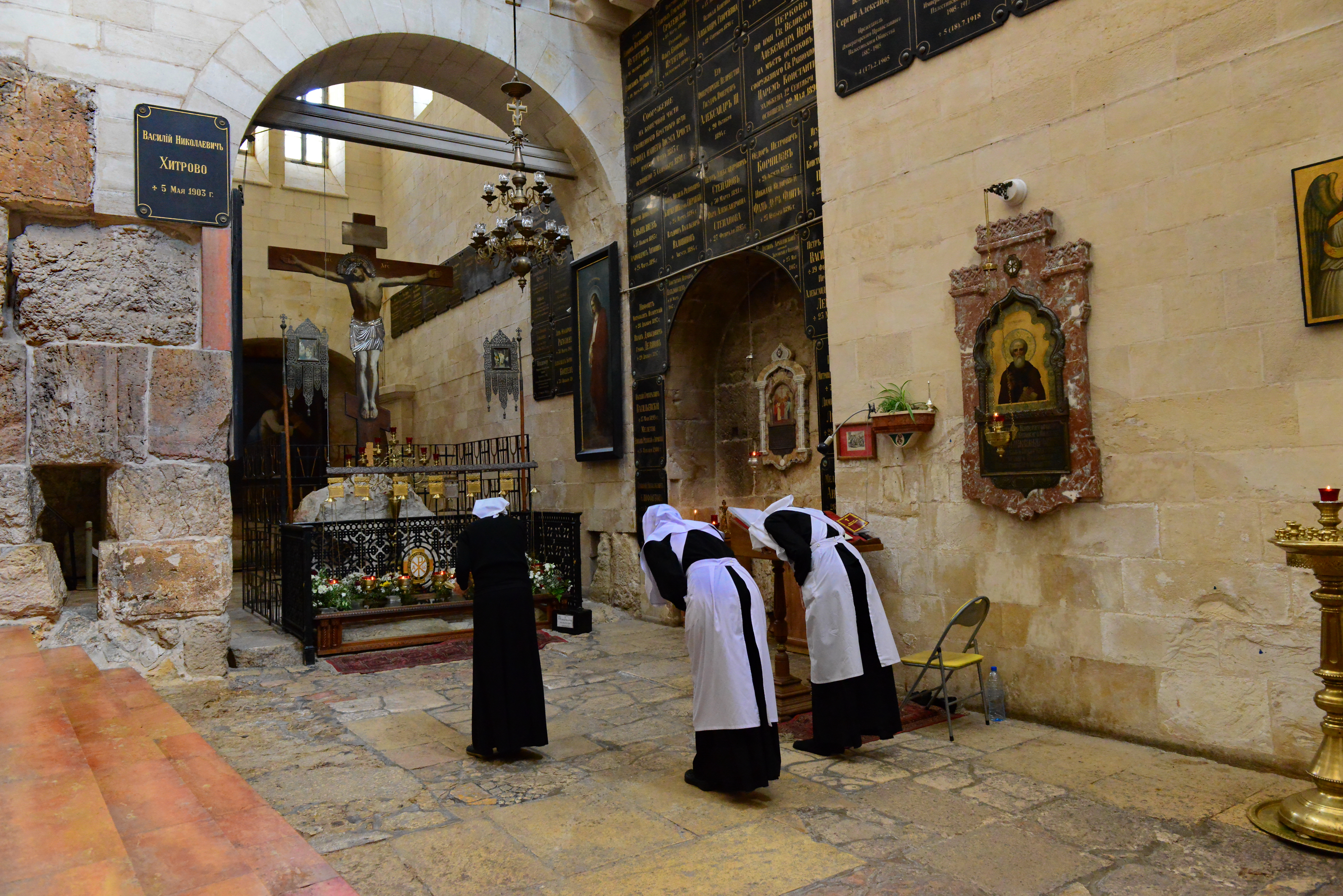 כנסיית אלכסנדר נבסקי, מנזר וכנסייה הנמצאים ברובע הנוצרי של העיר העתיקה בירושלים, במרחק כמה עשרות מטרים מכנסיית הקבר ומול הכניסה הצפונית לכנסיית הגואל.